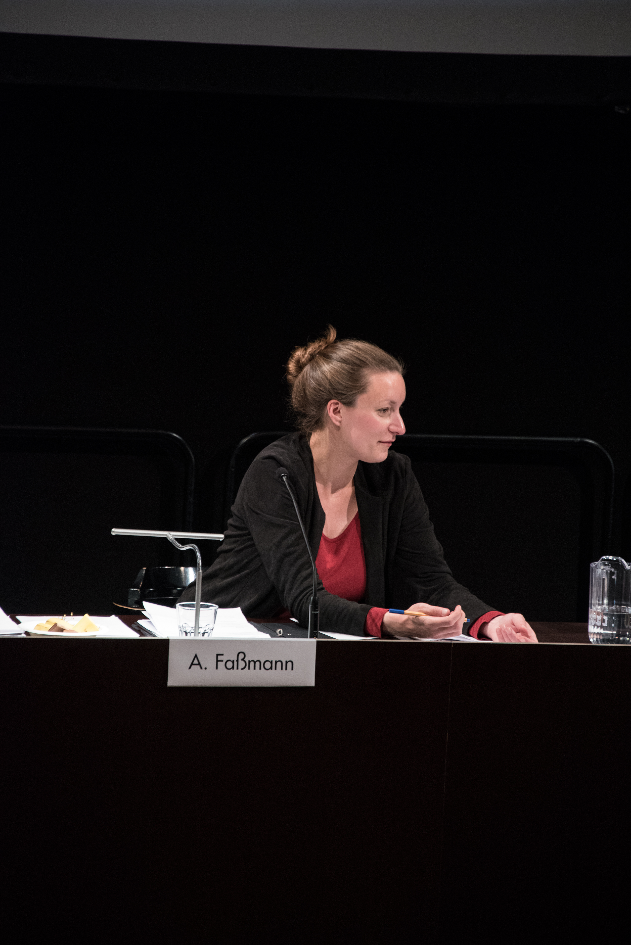 Das Kapitalismustribunal, Brut, 2016